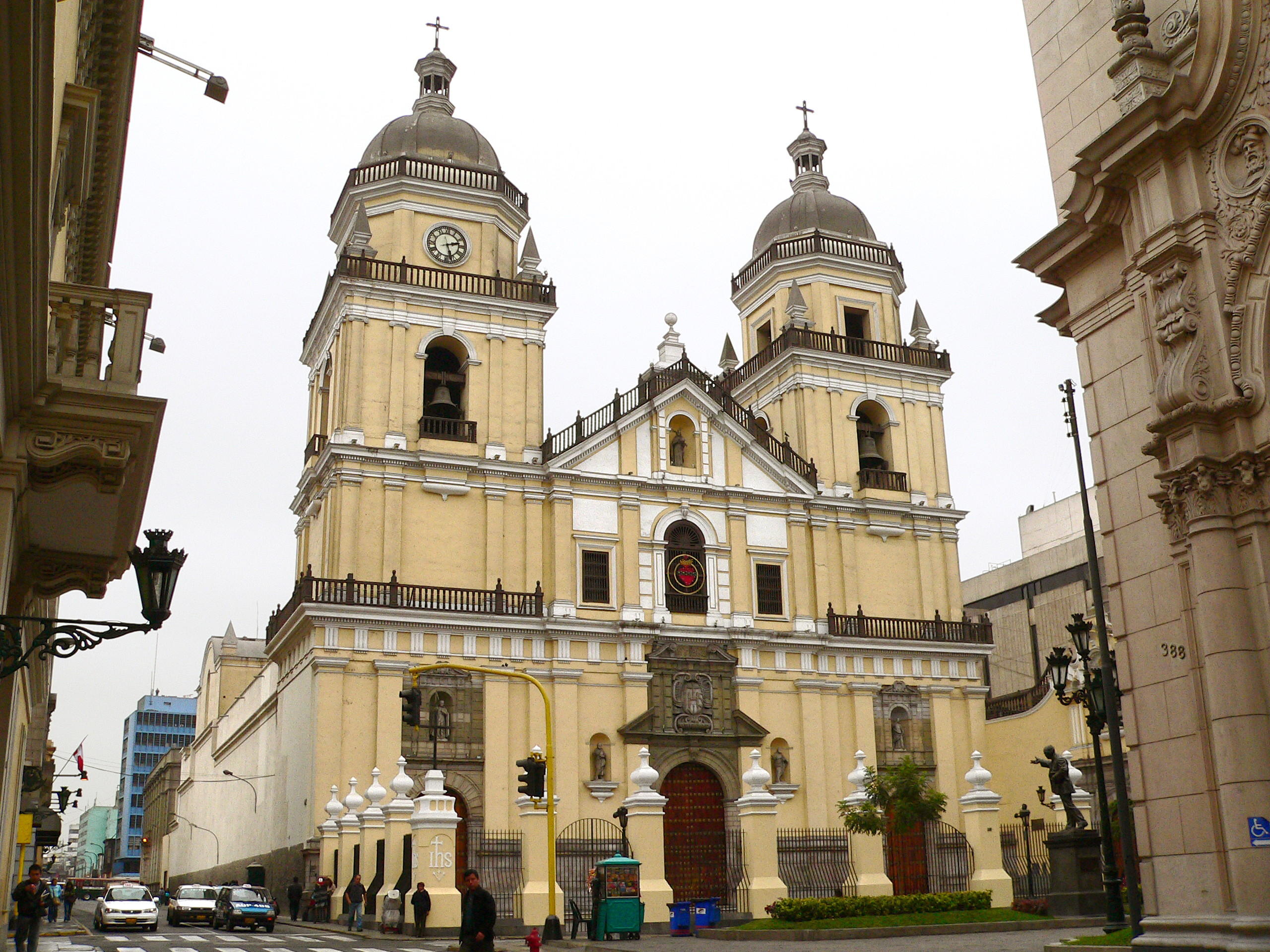 Descripción: Basílica de San Pedro Lugar: Centro Histórico de Lima Distrito : Cercado de Lima Ciudad : Lima País : Perú Fotógrafo: © Manuel González Olaechea y Franco Fecha de la foto : 8 de julio de 2007